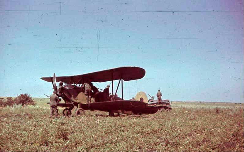 Ein sowjet. Flugzeug ist abgeschossen und setzt zur Notlandung an (Ratta) Ukraine Sommer 1941